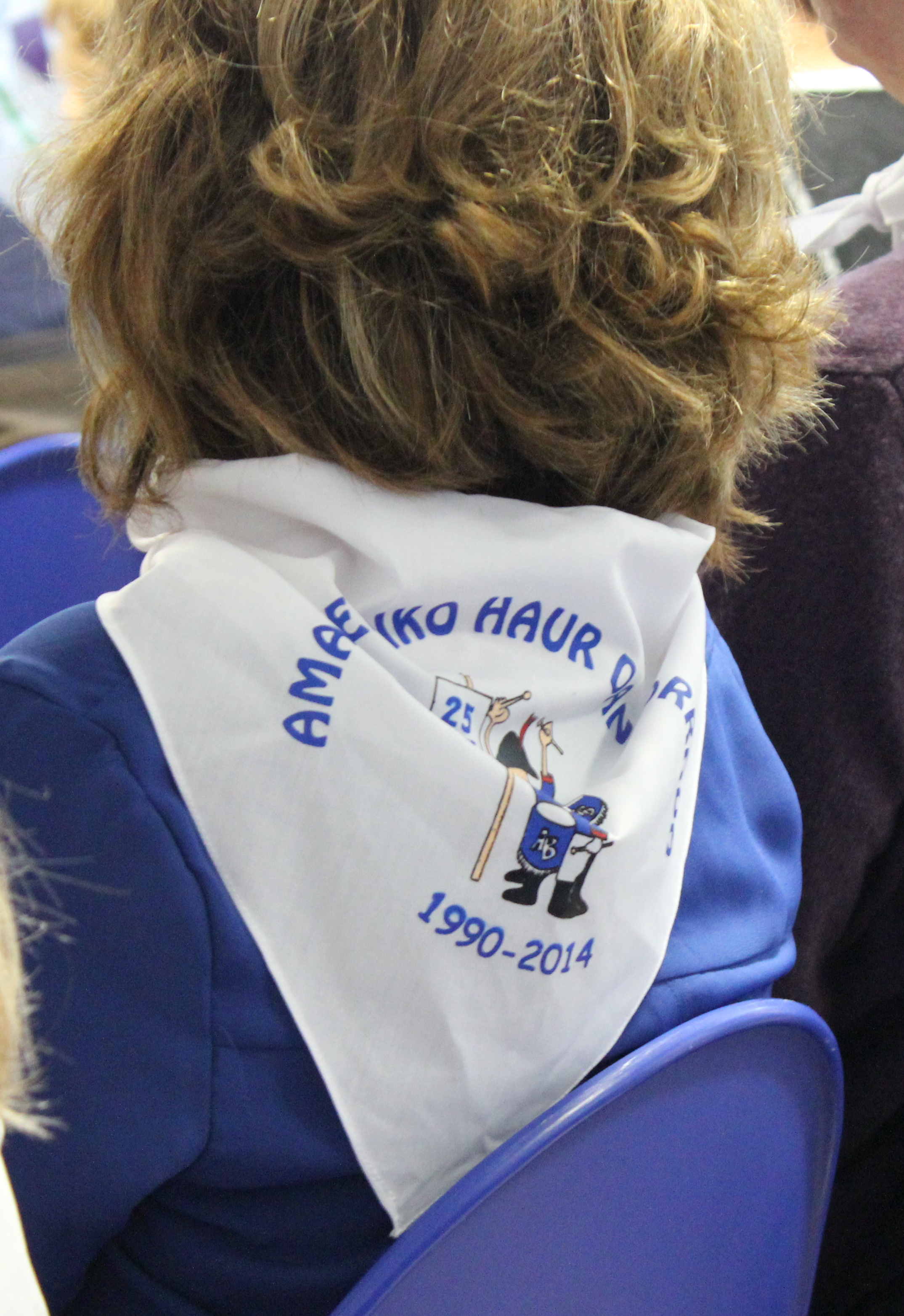 Hogeitabostgarren urteko oroimen painelua Amara Berriko Haur Danborrada